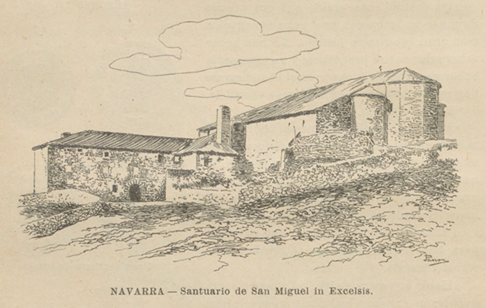 Navarra. Santuario de San Miguel in Excelsis.